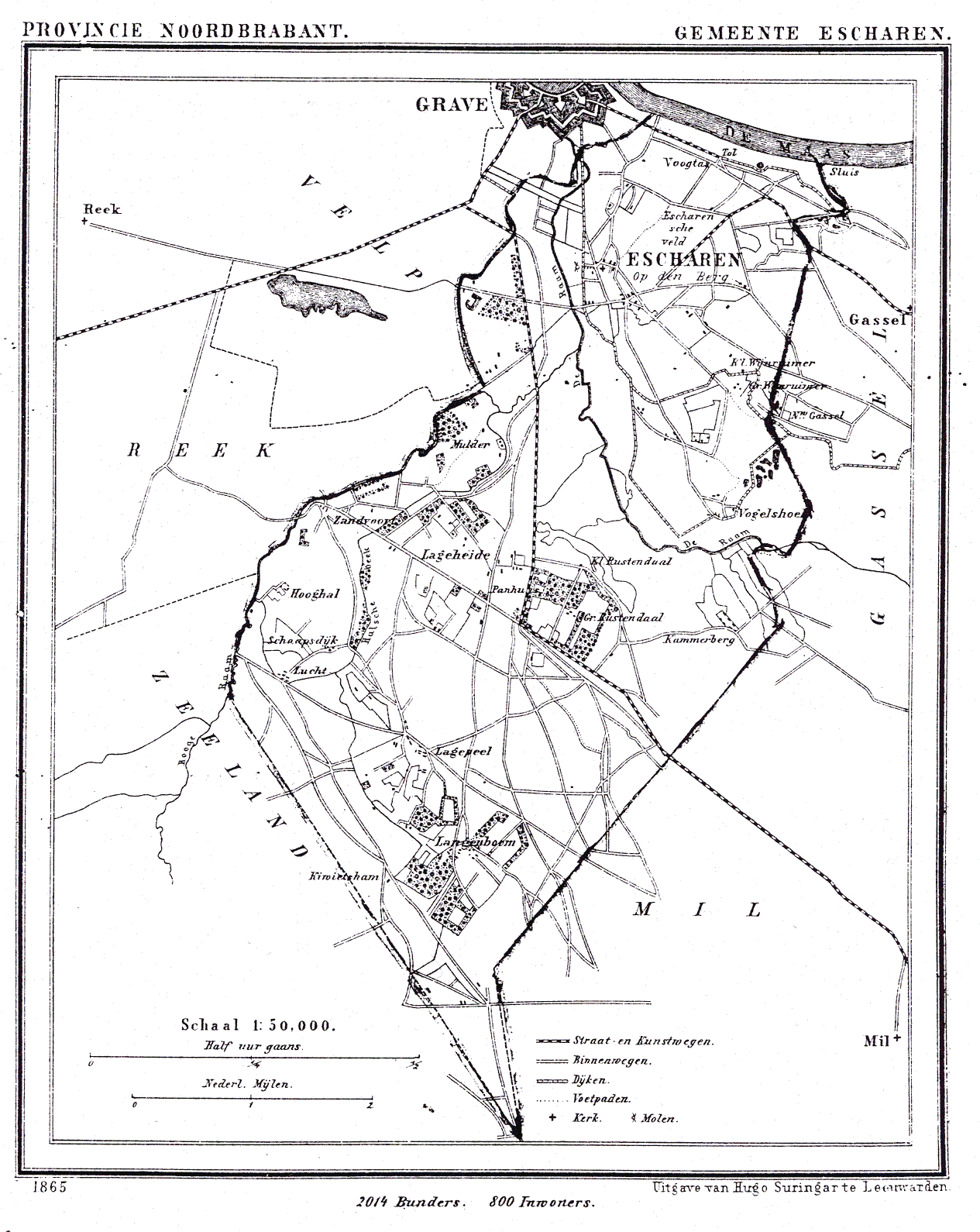 Nederland, Noord-Brabant, Gemeente Escharen